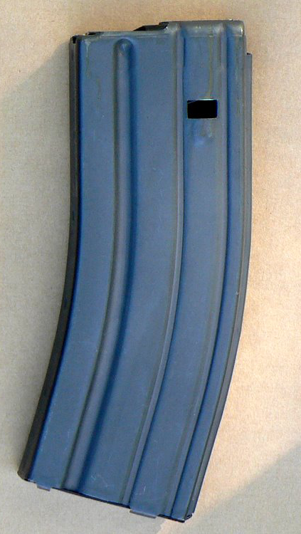 STANAG 30Rs Mag